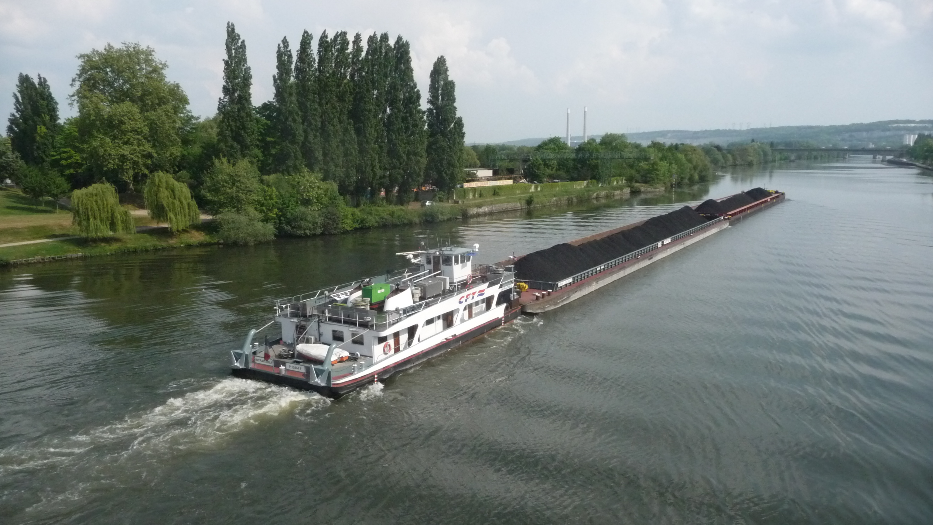 Convoi poussé de charbon sur la Seine à la traversée de Mantes-la-Jolie (avec 2 barges de 2600t utiles)